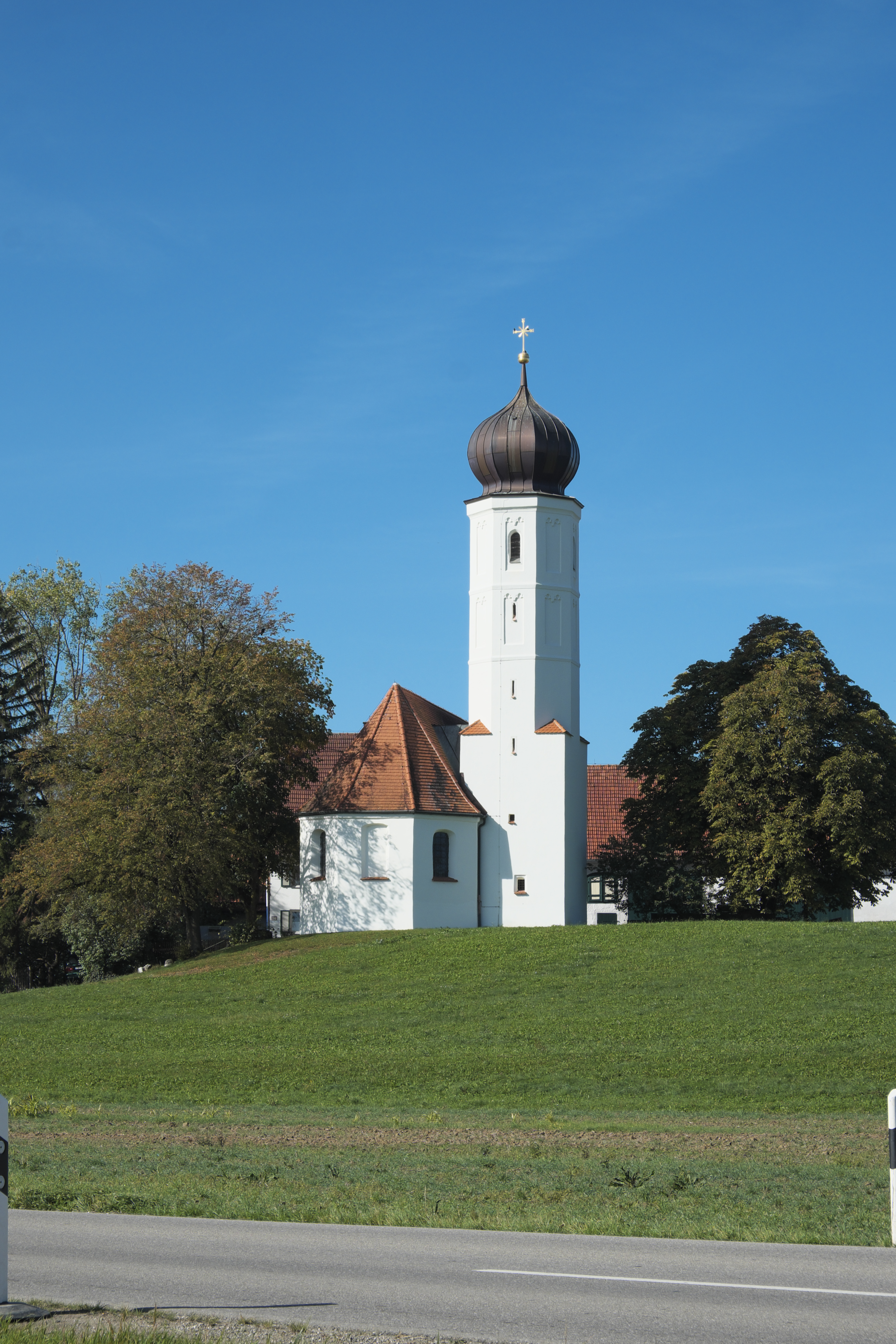 Katholische Filialkirche St. Maria (Maria Himmelfahrt) in Bergkirchen (Jesenwang) im Landkreis Fürstenfeldbruck (Bayern/Deutschland)